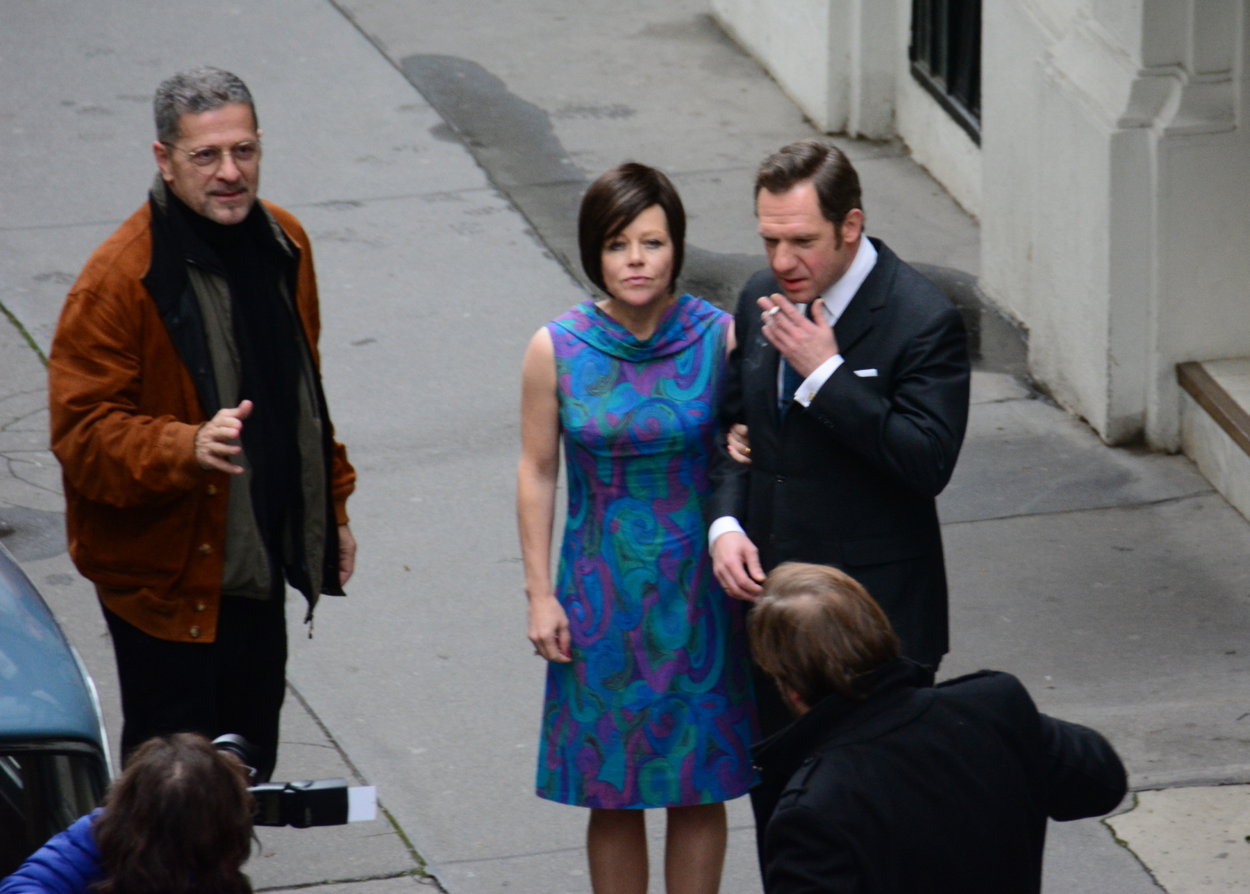 Eva Spreitzhofer, Johannes Zeiler und Regisseur Franz Novotny bei Dreharbeiten für den Film „Deckname: Holec“ am Tiefen Graben in Wien.